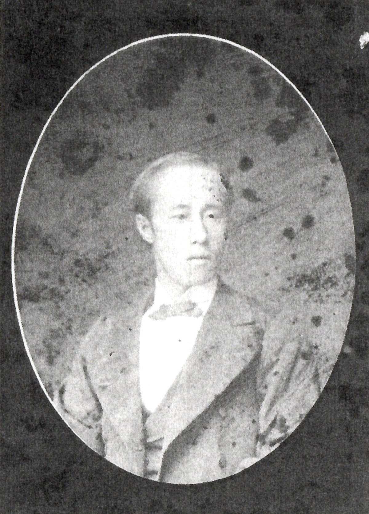 板倉勝己の肖像写真。